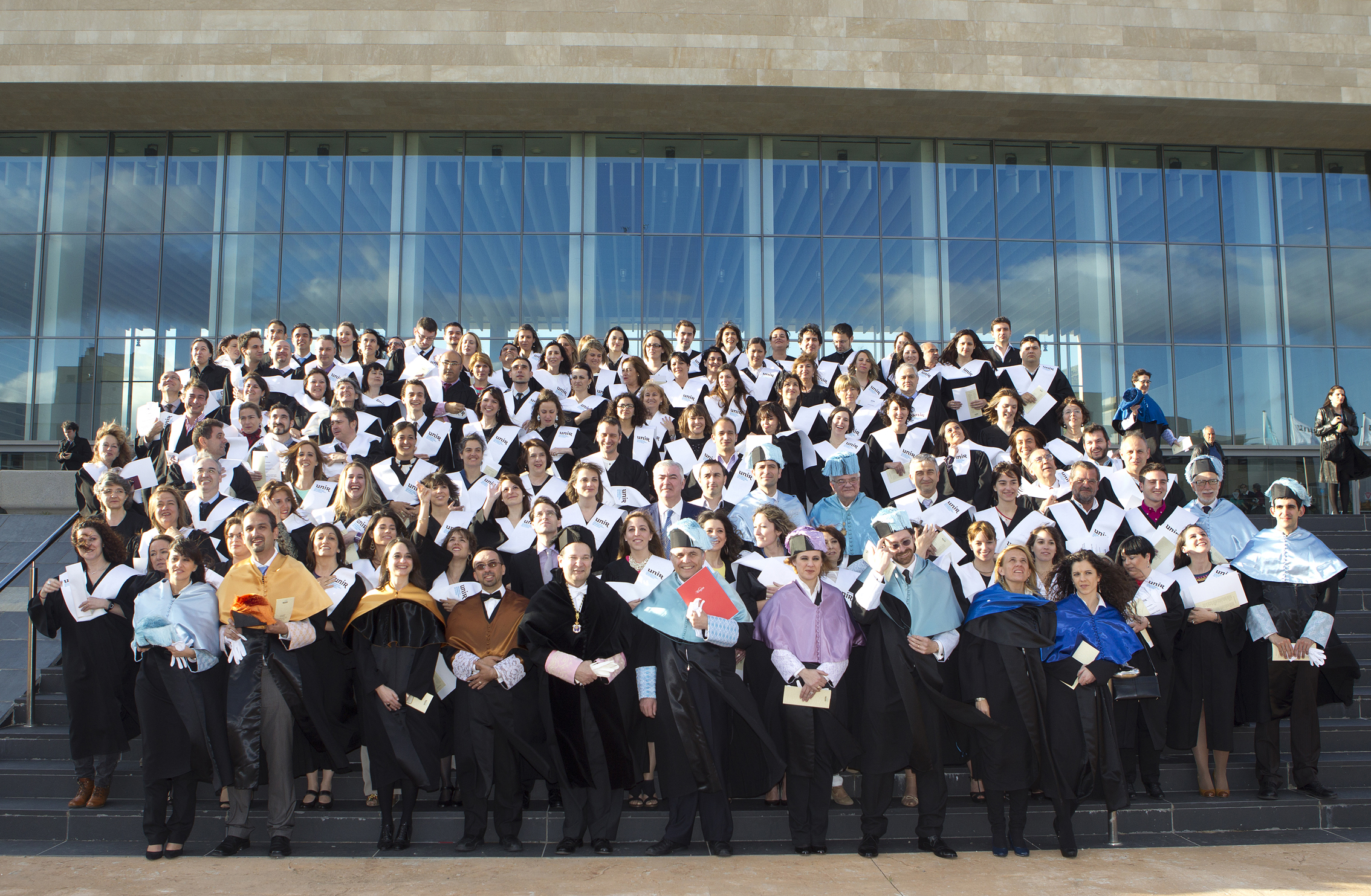 La primera graduación de UNIR tuvo lugar un Logroño y en ella se graduaron 200 alumnos de los grados de Maestro en Educación Infantil y Primaria y de varios postgrados de la Universidad Internacional de la Rioja. El 1 de junio del 2013.